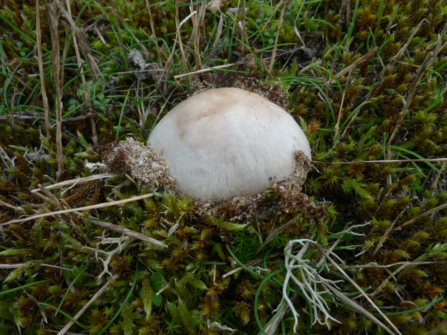 Agaricus devoniensis, baie des Trépassés (Plogoff, Finistère, Bretagne, France)